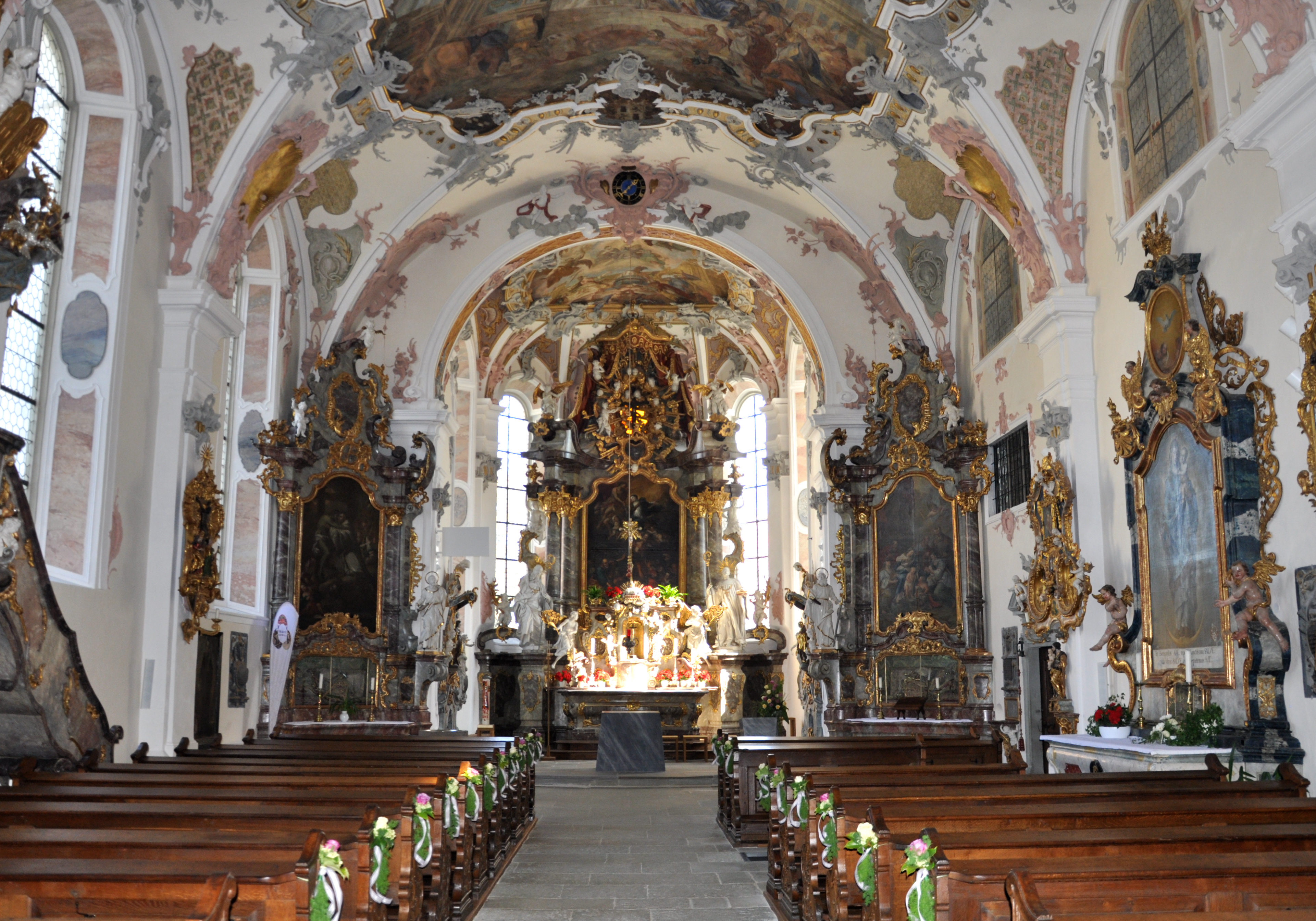 Wald (Landkreis Sigmaringen), Klosterkirche, Innenansicht